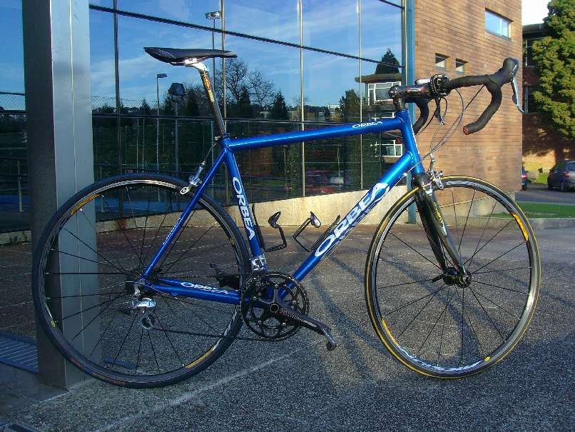 Road Bike Orbea Lobular